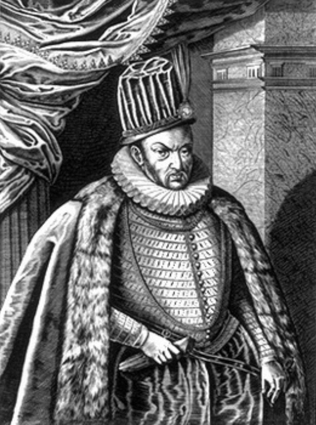 Herzog Albrecht Friedrich von Preußen (1553-1618). Er war der zweite Herzog Preußens.